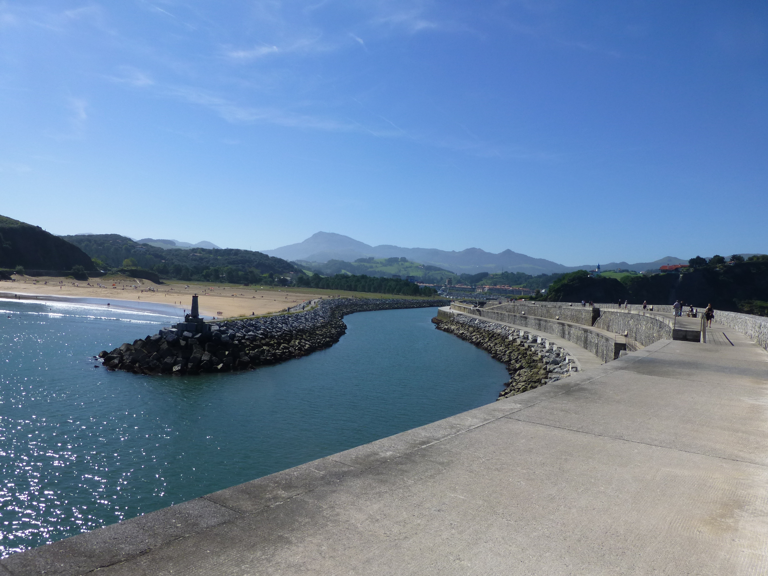 Playa de Santiago y ría del Urola en Zumaia, Gipuzkoa, en el País vasco (España).